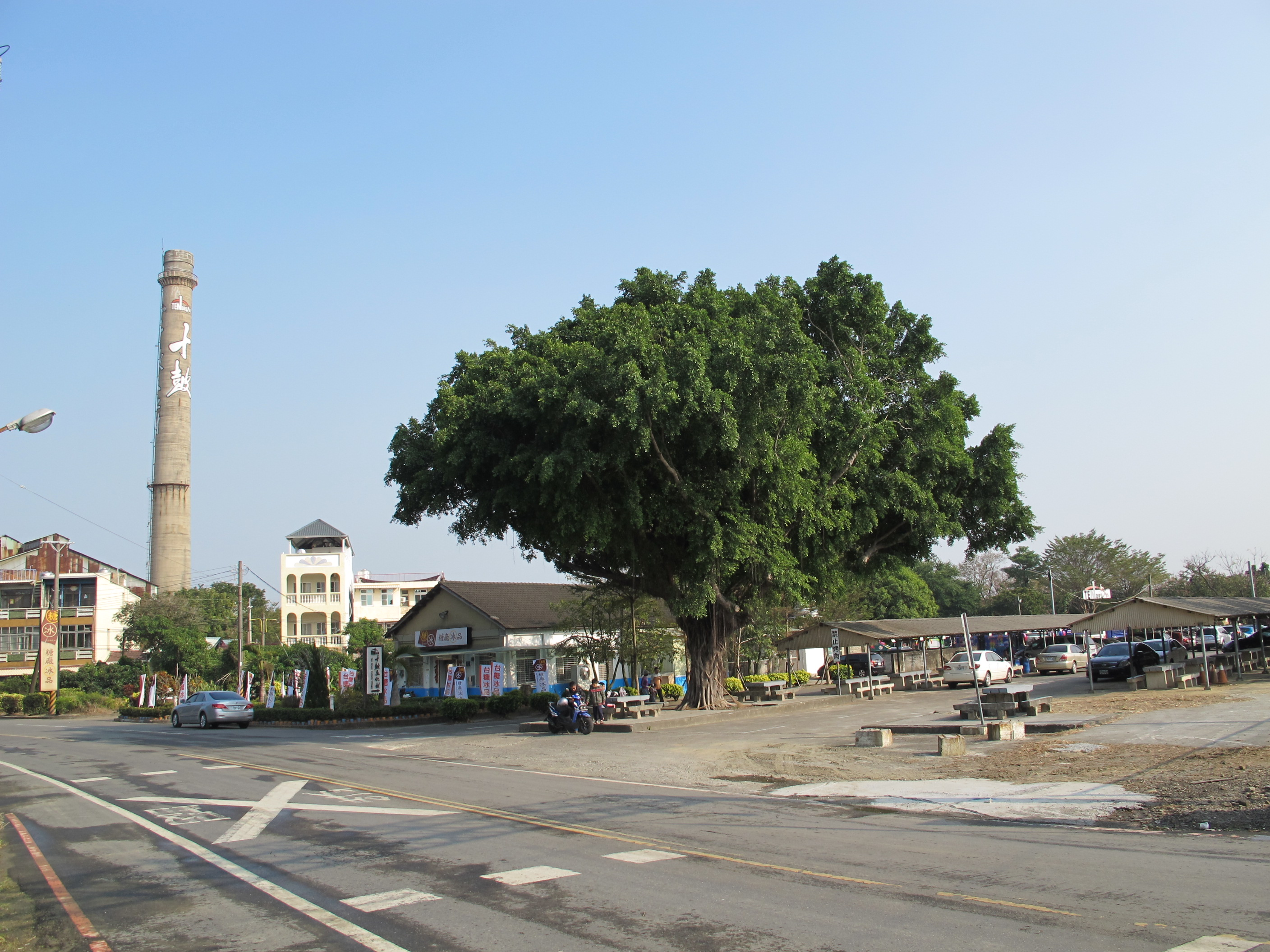 十鼓文化村旁的大榕樹